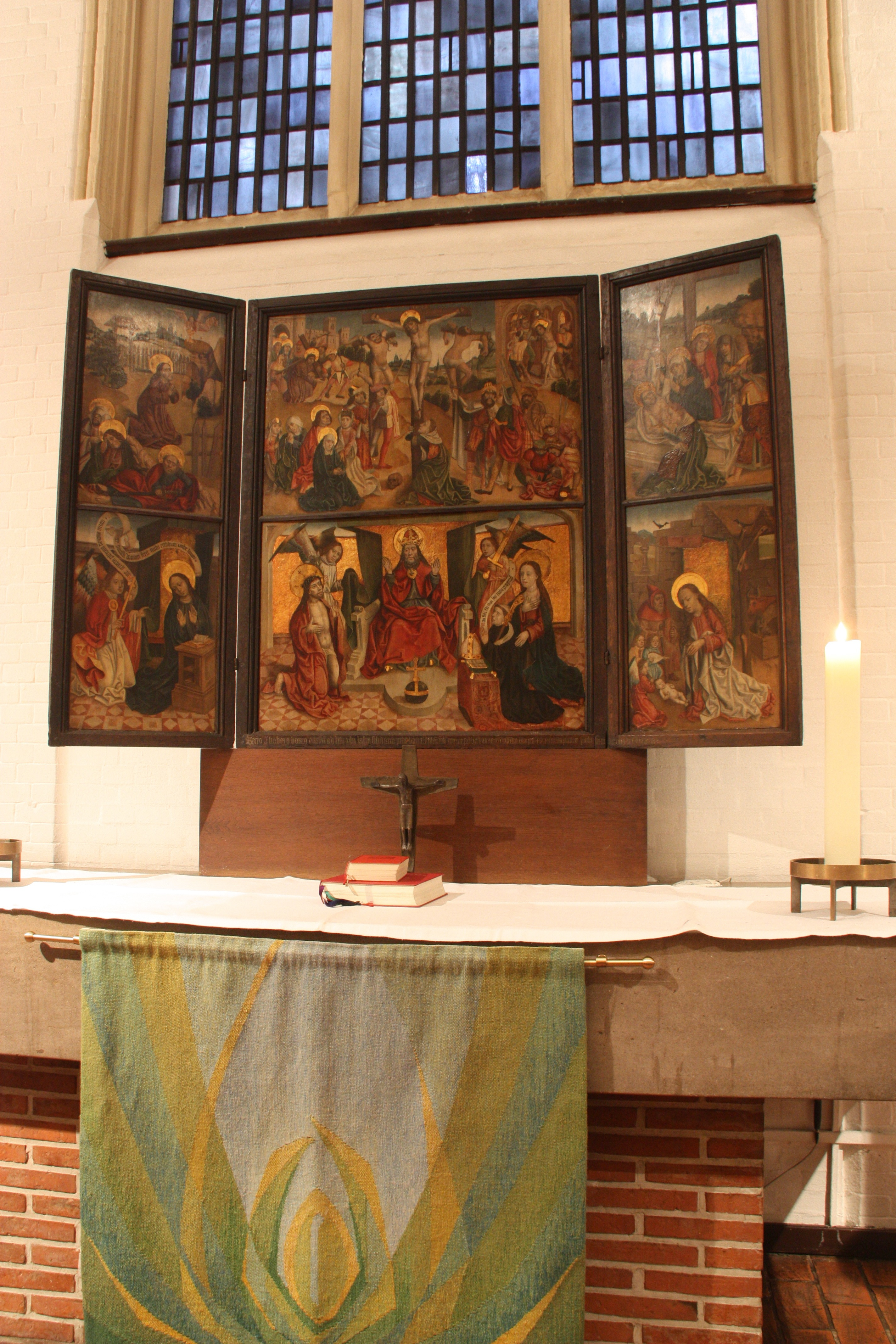 Hamburg, Osterkirche Eilbek, Altarbild